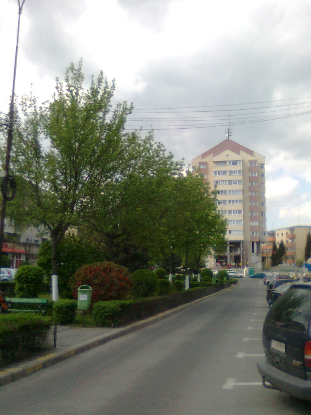 Kolozsvári Pasteur utca vége